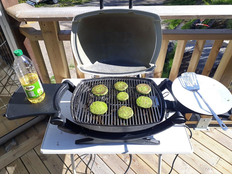 Weber Q140 med ärtbiffar.